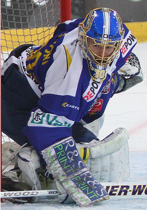 Leonardo Genoni, ZSC Lions vs HC Davos, 3 mars 2012.